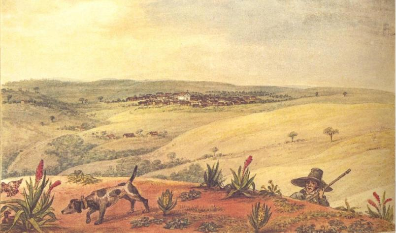 Itapeva em 1827. Obra de Jean-Baptiste Debret